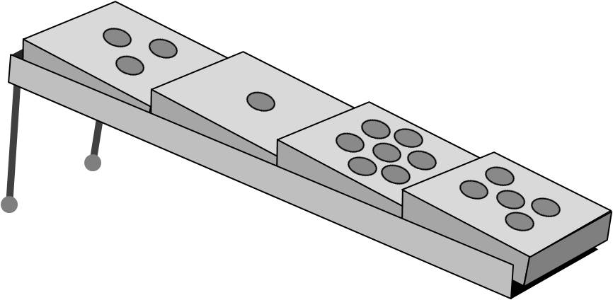 Croquis pour expliquer le jeu Apagos.